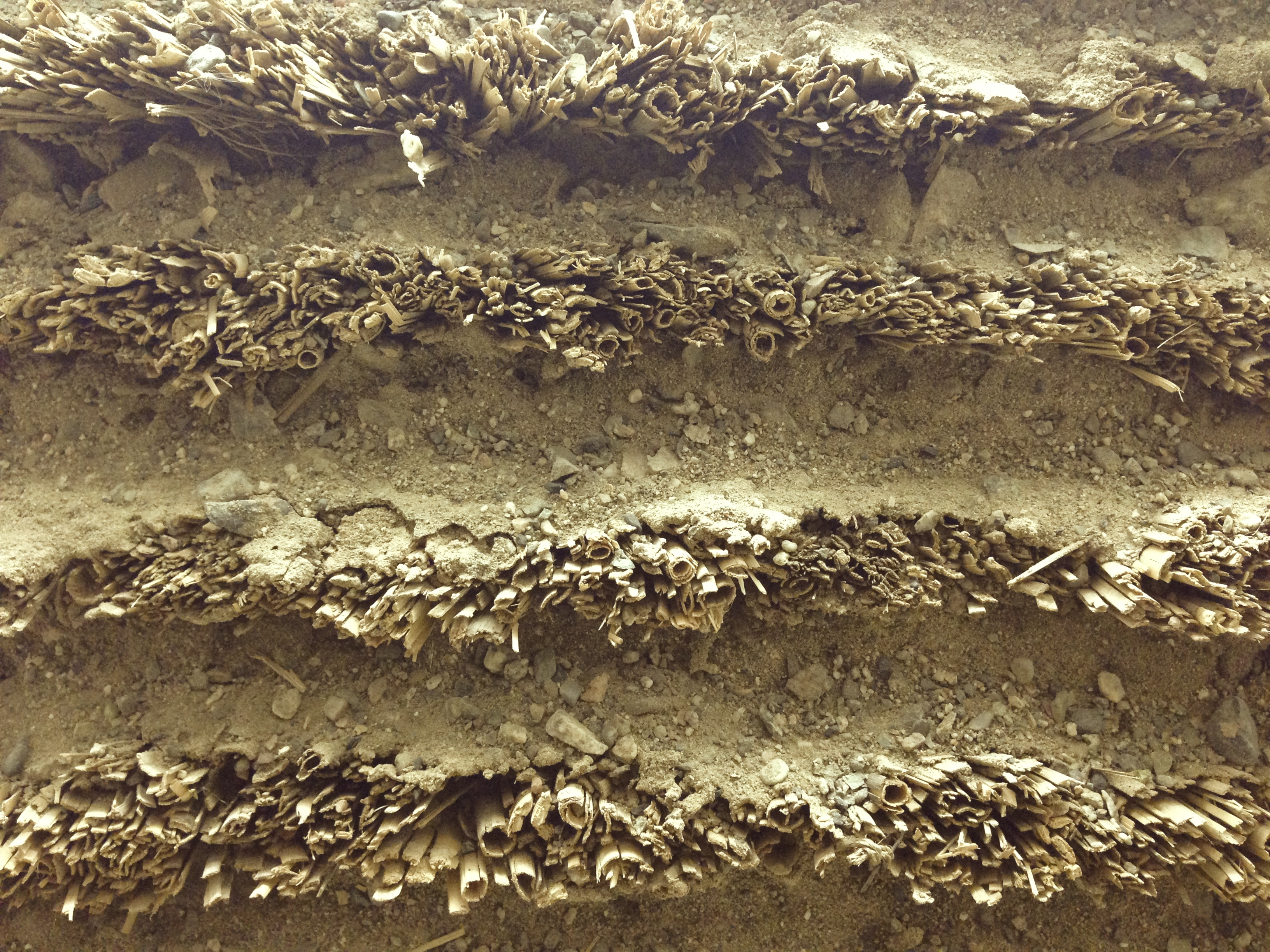 Närbild på strukturen av den Kinesiska muren från Handynastin i Gansu